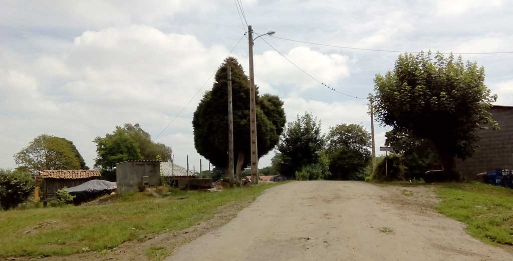 Vista do Formigueiro, Curtis.